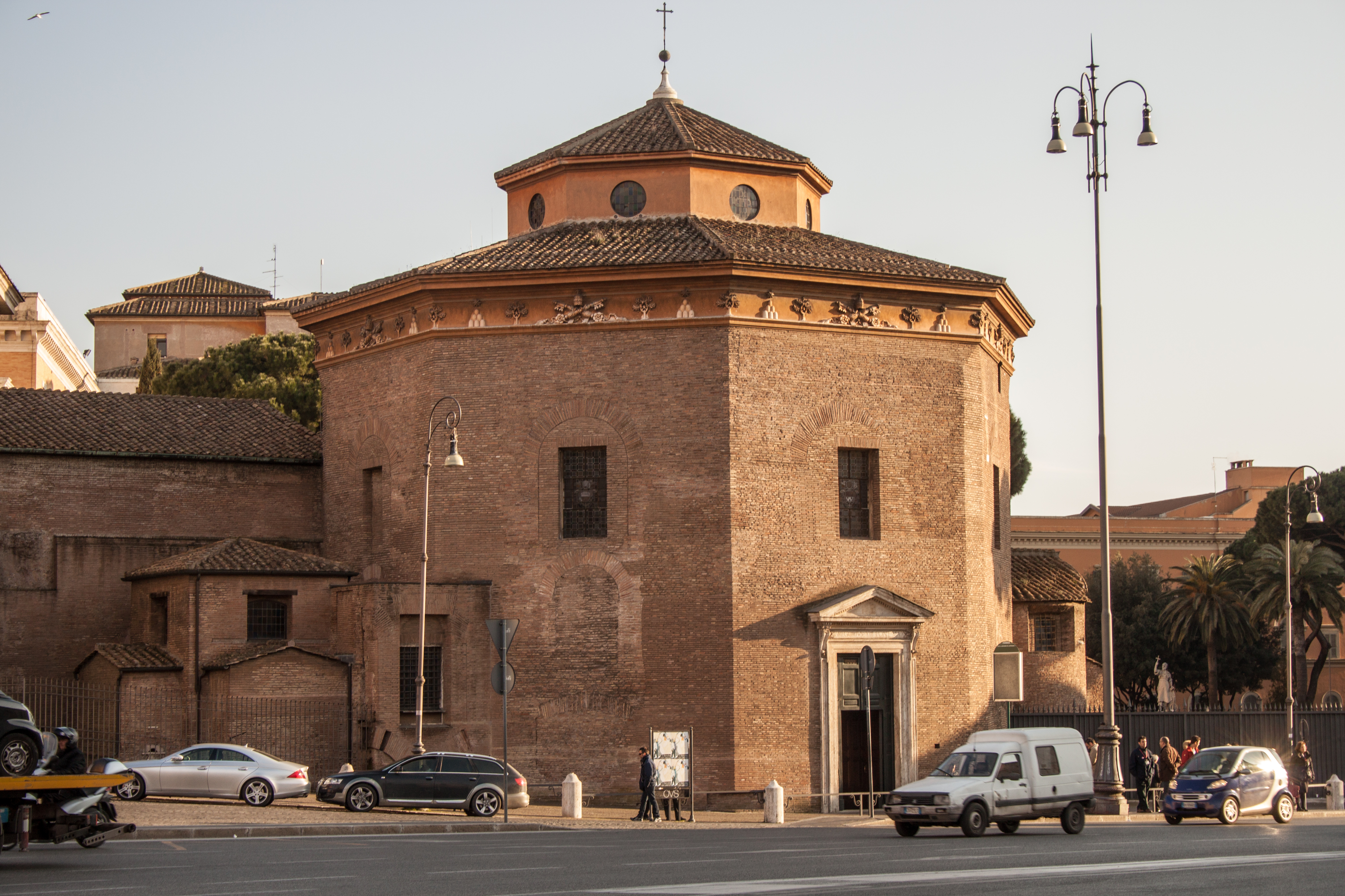 Battistero S Giovanni in Laterano